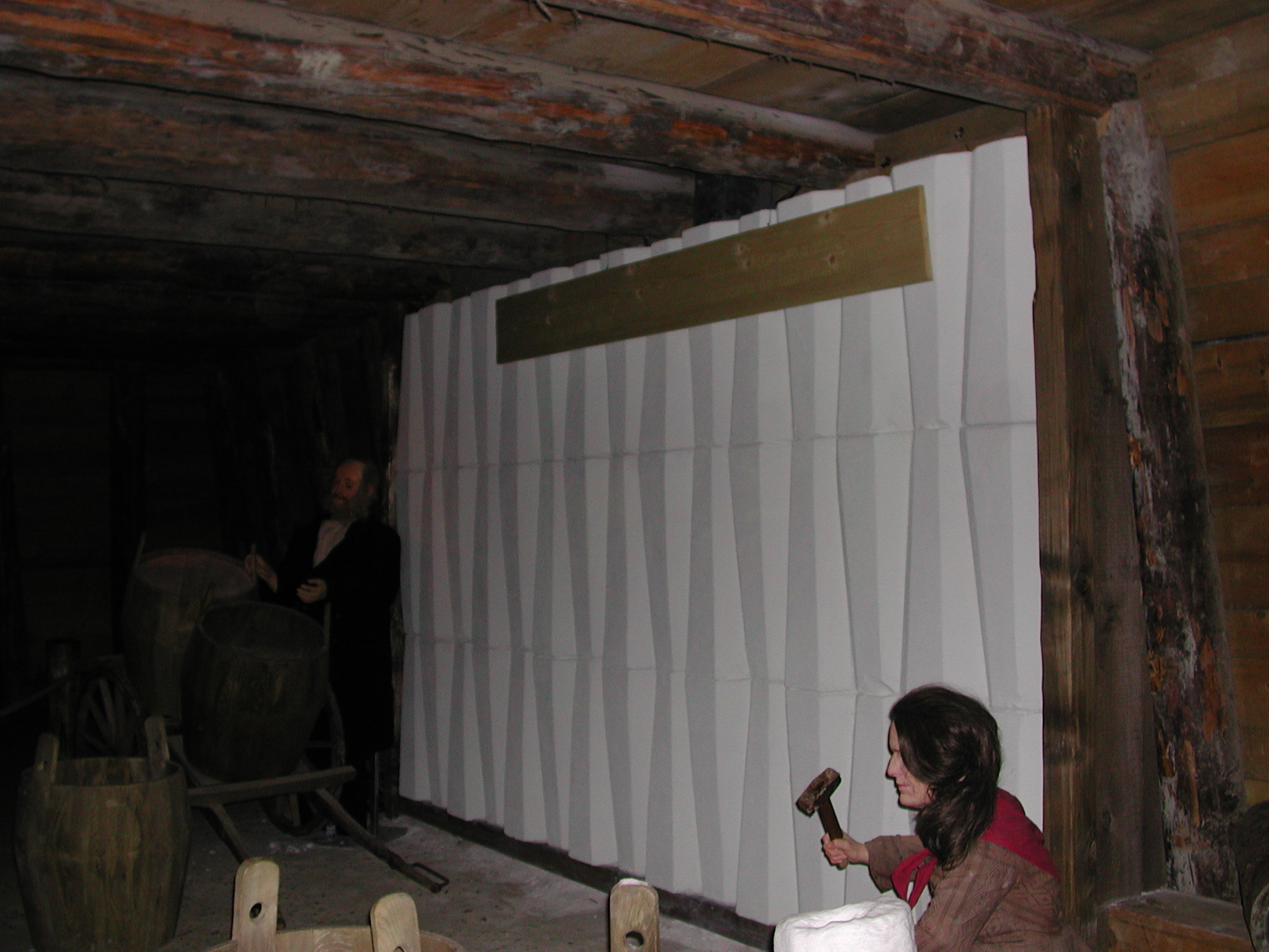 杜倫堡鹽礦 Salt Mine Durrnberg